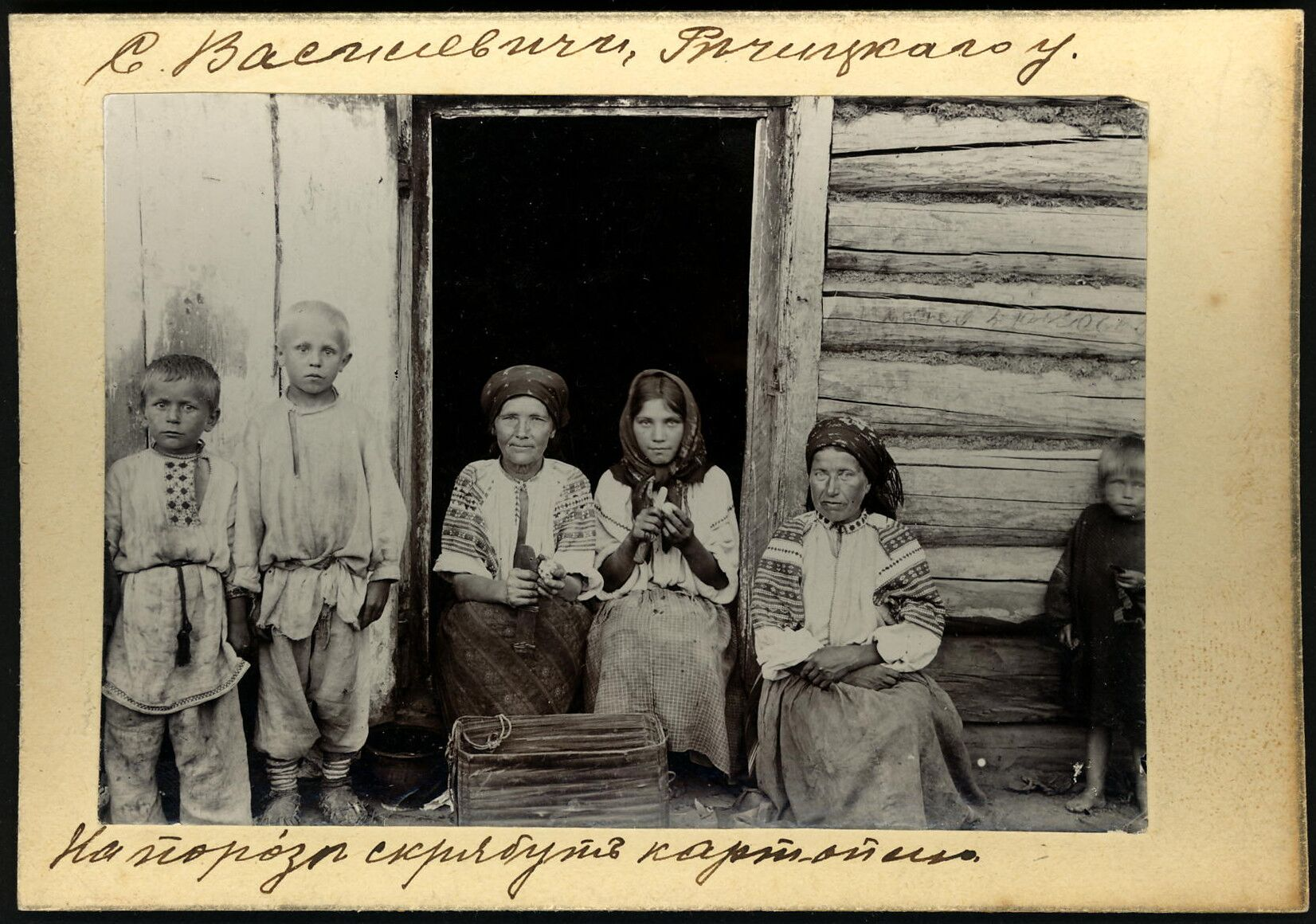 Фотография этнографа Исаака Сербова